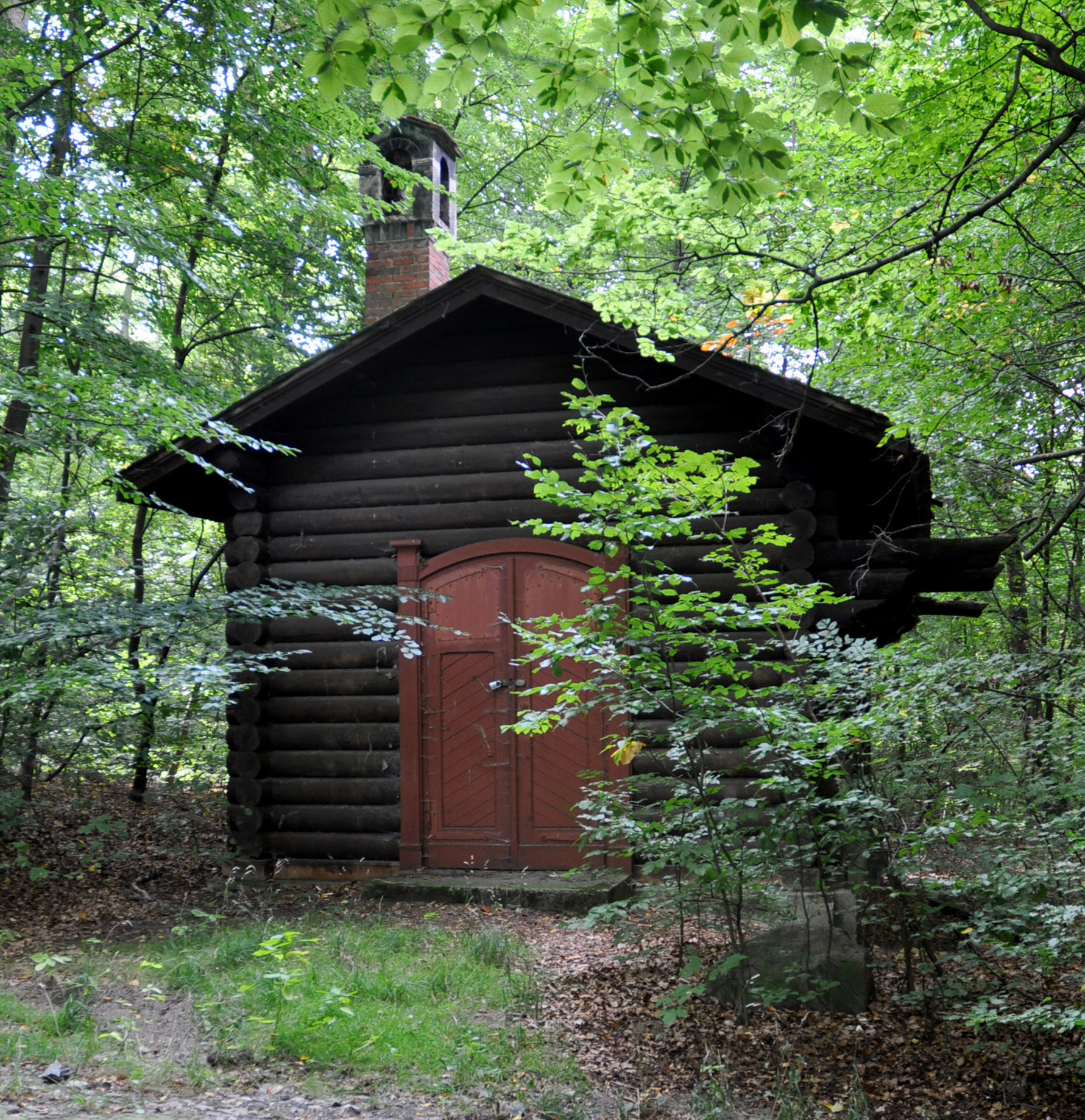 Die fast eingewachsene Einsiedelei von Nord